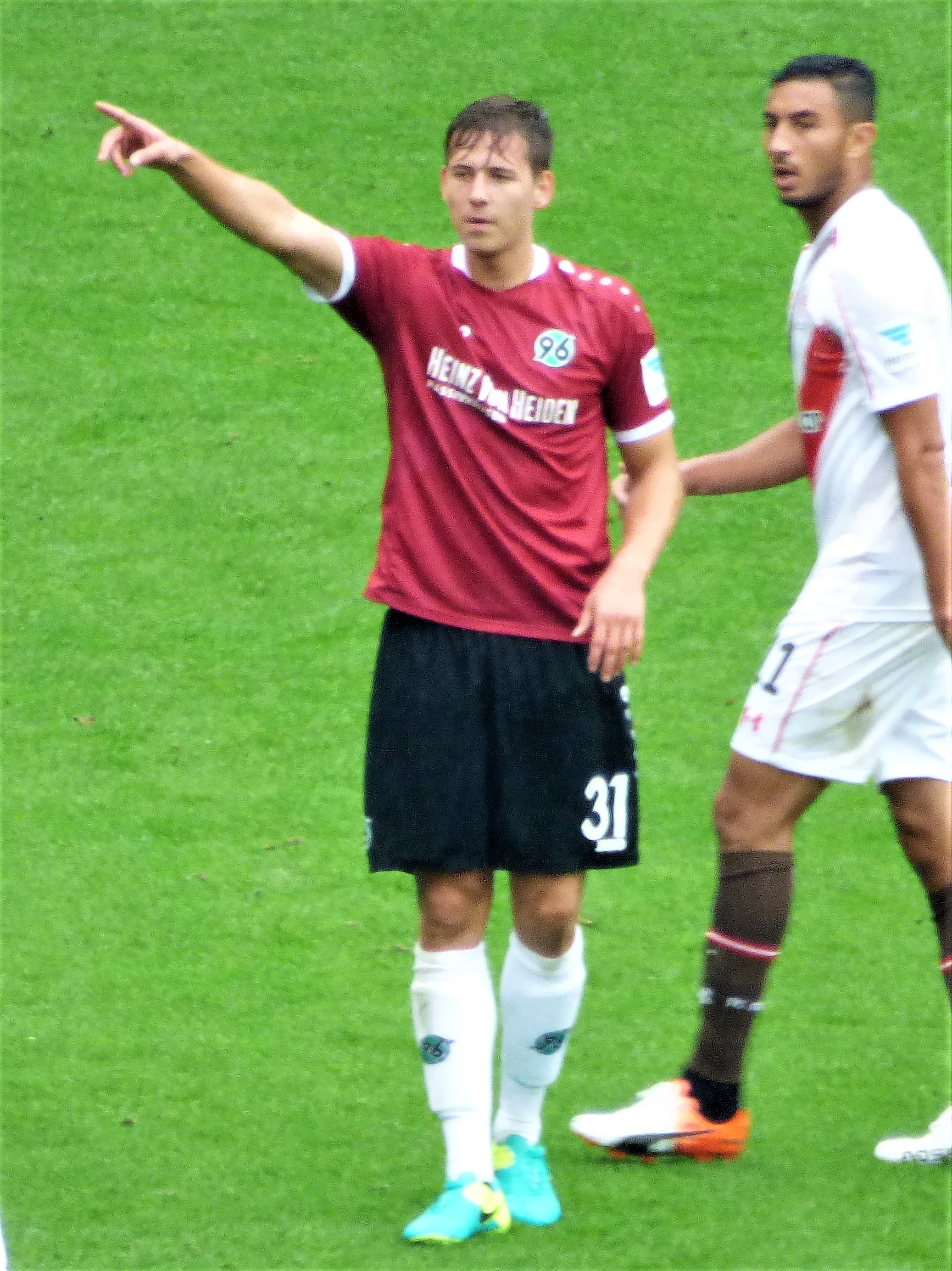 Waldemar Anton als Spieler von Hannover 96